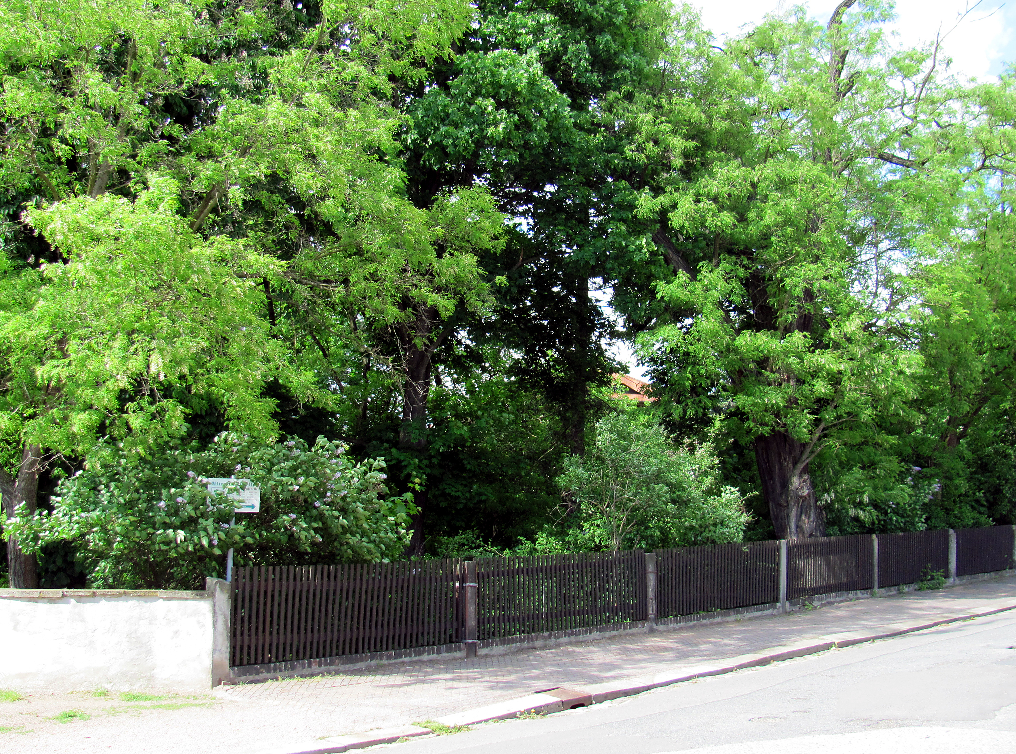 Radebeul, Landhaus Christian Gottlieb Ziller, Park